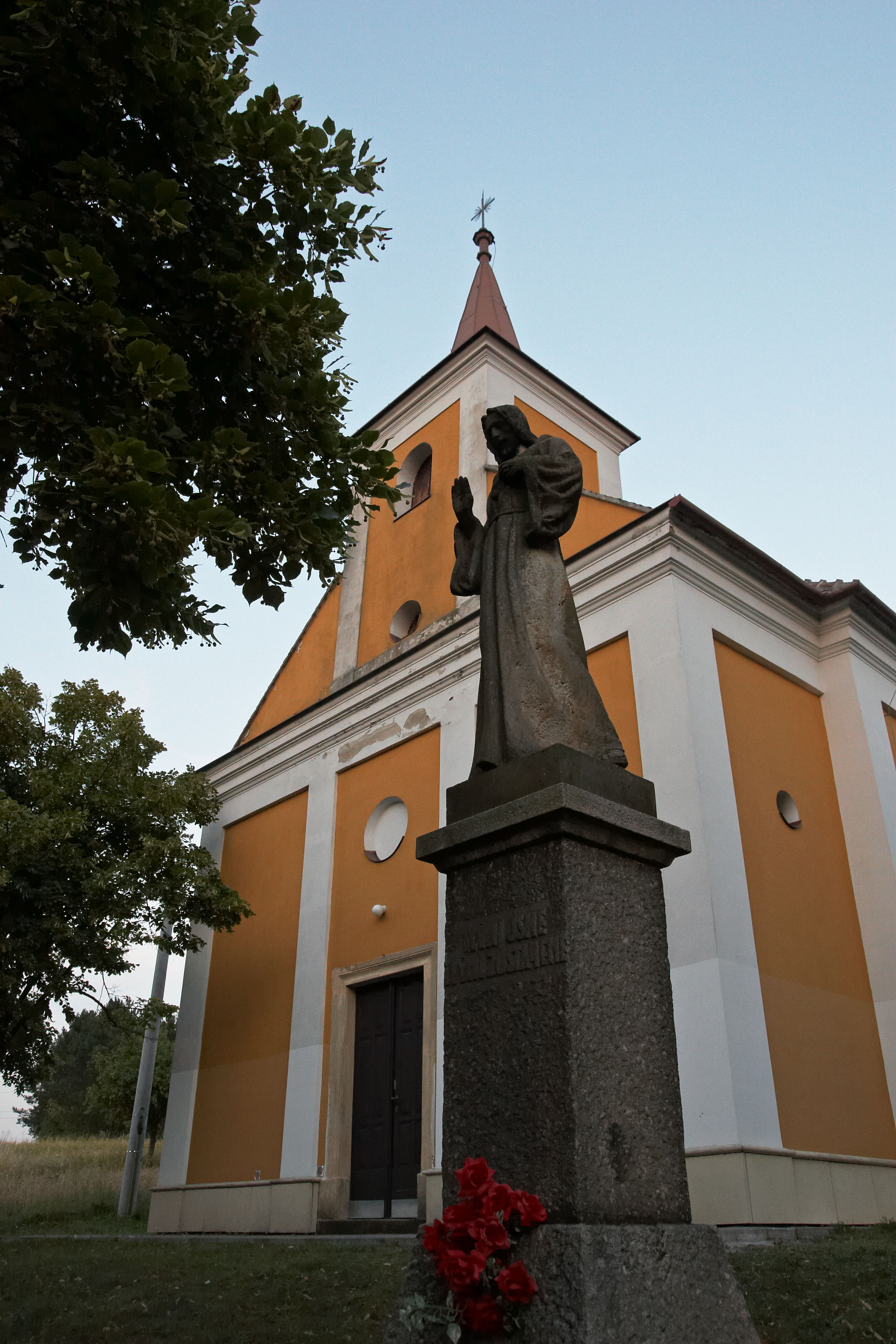 Němčany, Lutršték, Poutní kaple P. Marie Sedmibolestné